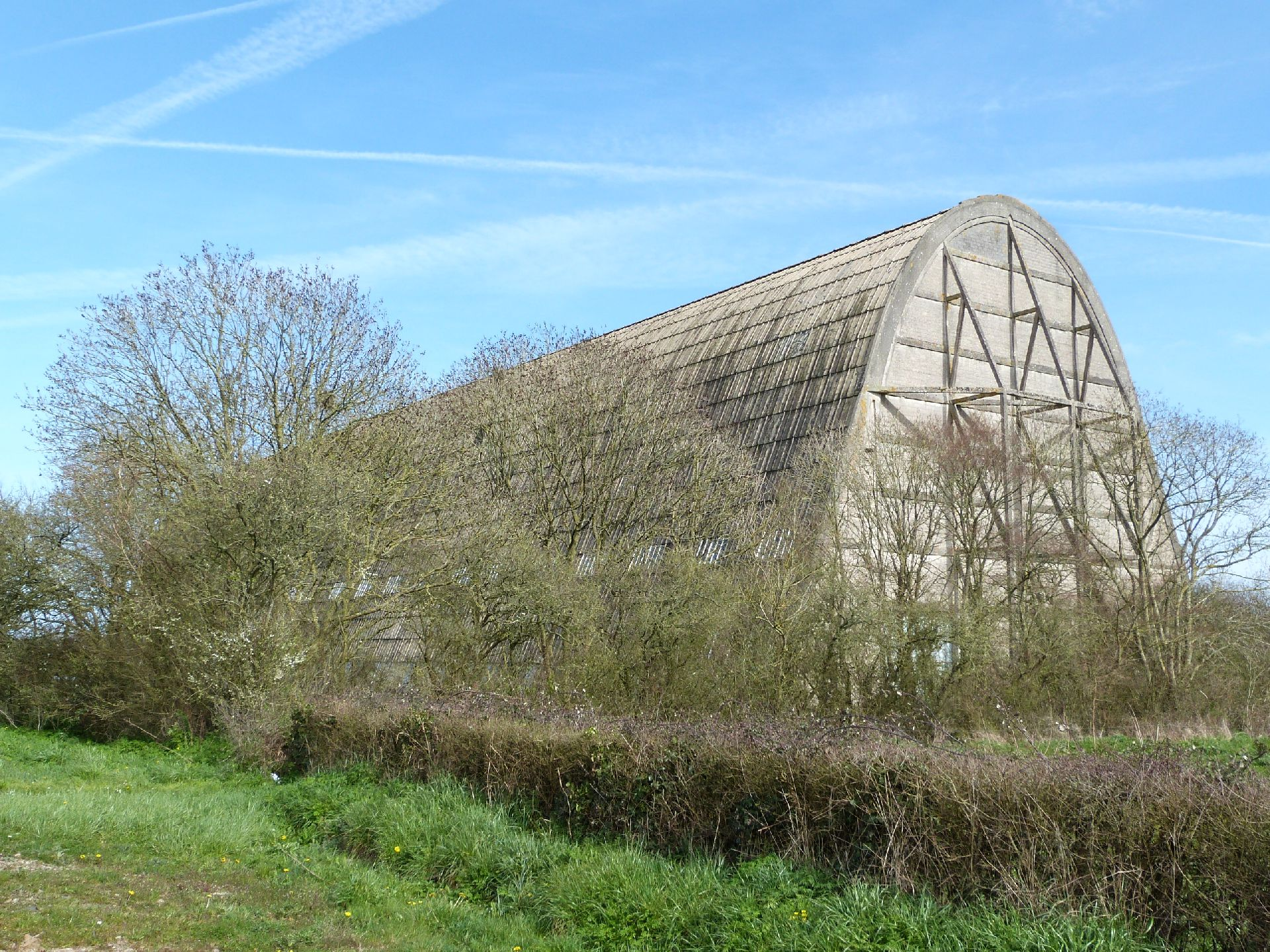 Hangar à dirigeables d'Écausseville dans la Manche en Basse-Normandie.